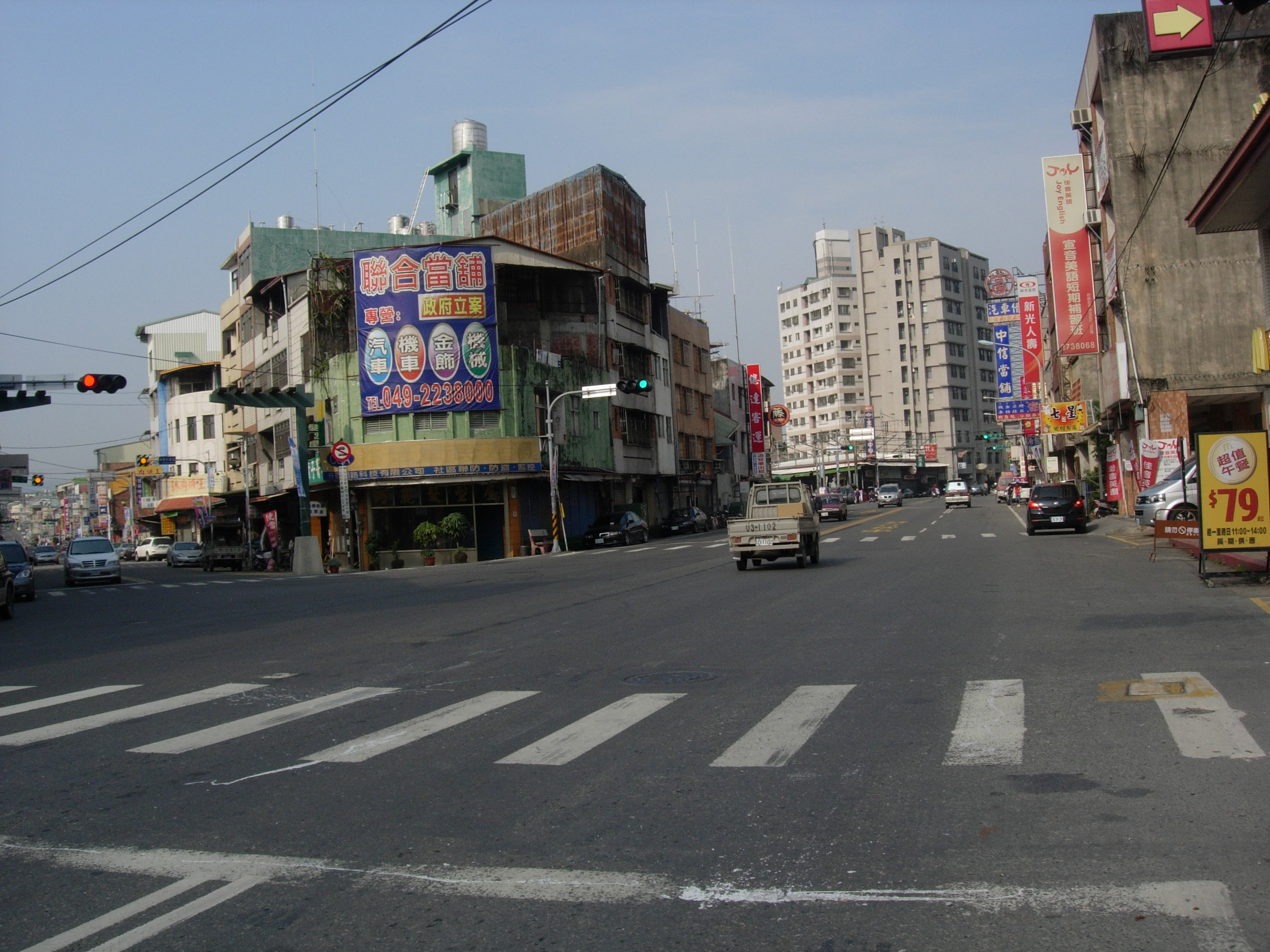 中文（台灣）: 南投縣名間鄉市街一景。